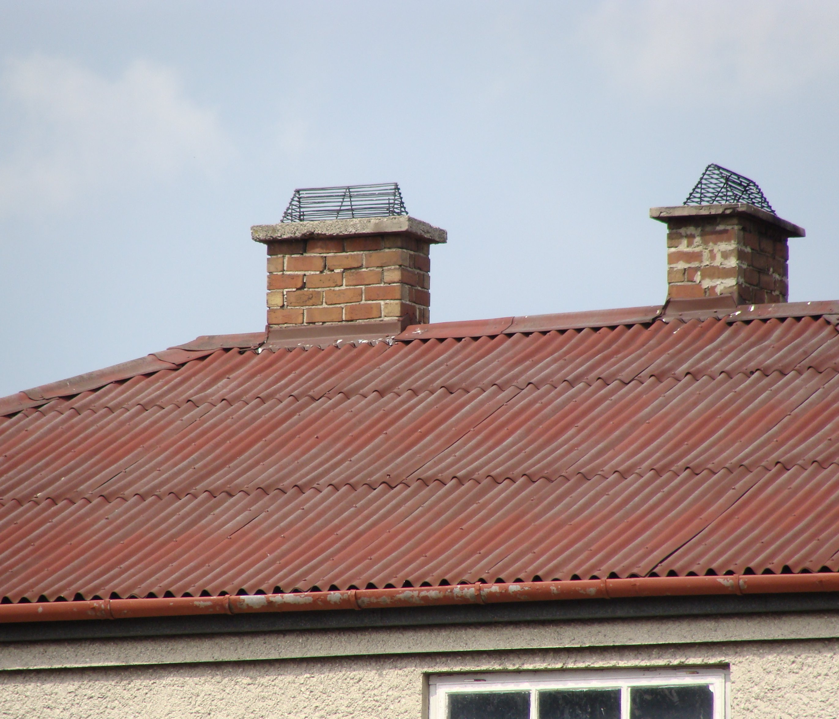 Zabezpieczenie komina przed kawkami